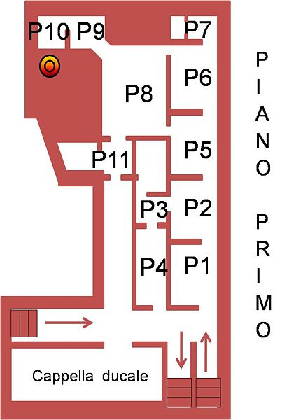 Pianta del primo piano di palazzo Farnese a Piacenza